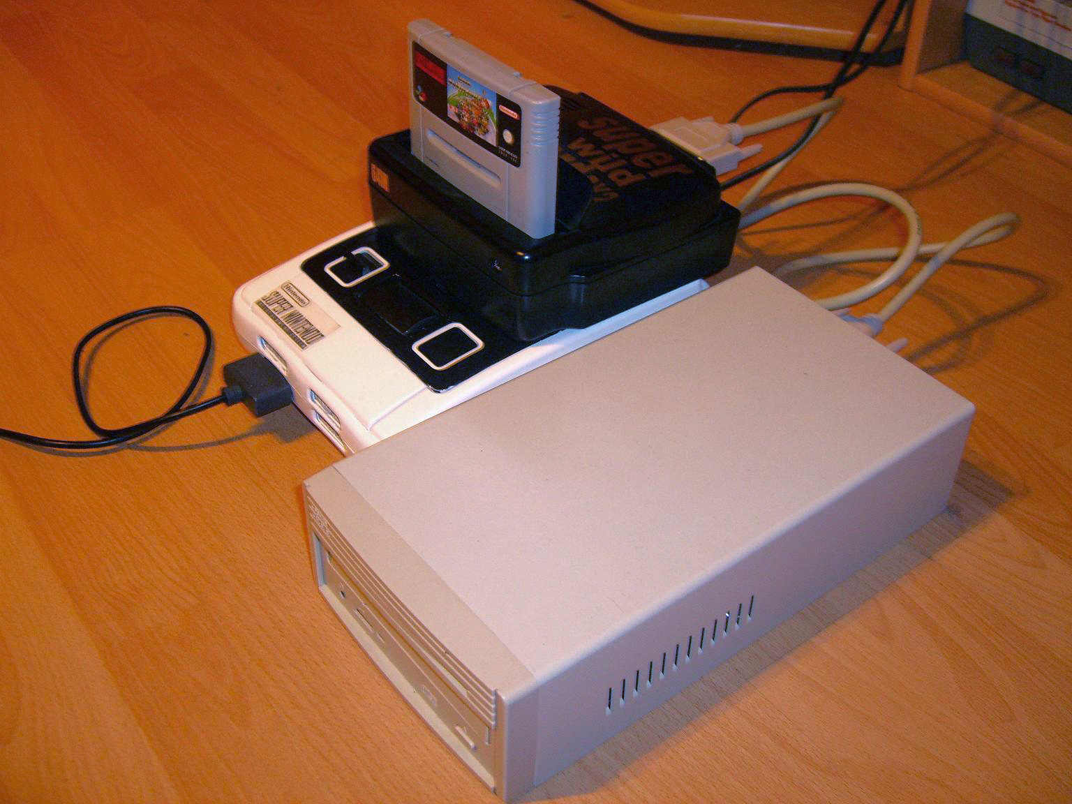 Kopierstation für SNES + CD und HDD Erweiterrung